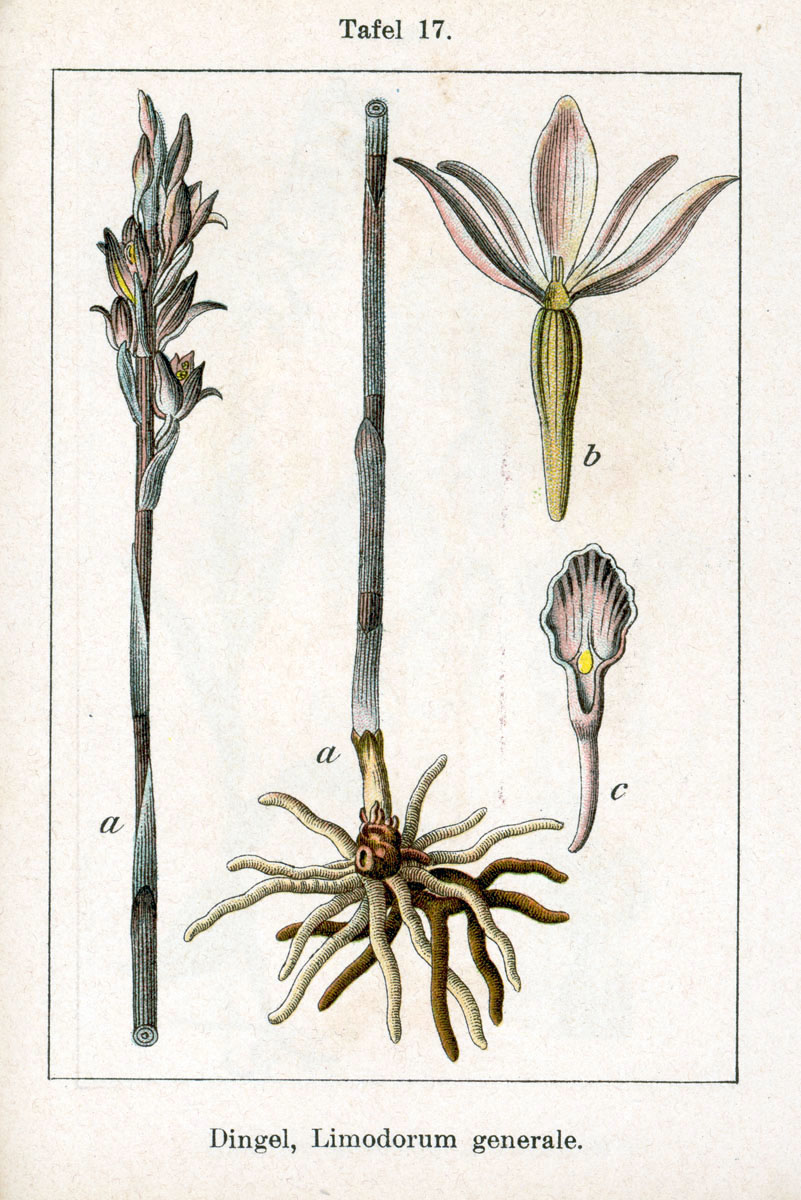 Limodorum abortivum (L.) Sw. var. abortivum, syn. Limodorum generale E.H.L.Krause Original Description Dingel, Limodorum generale